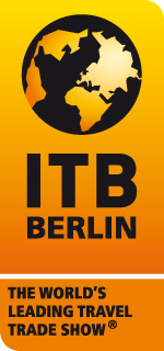 Logo ITB 2011